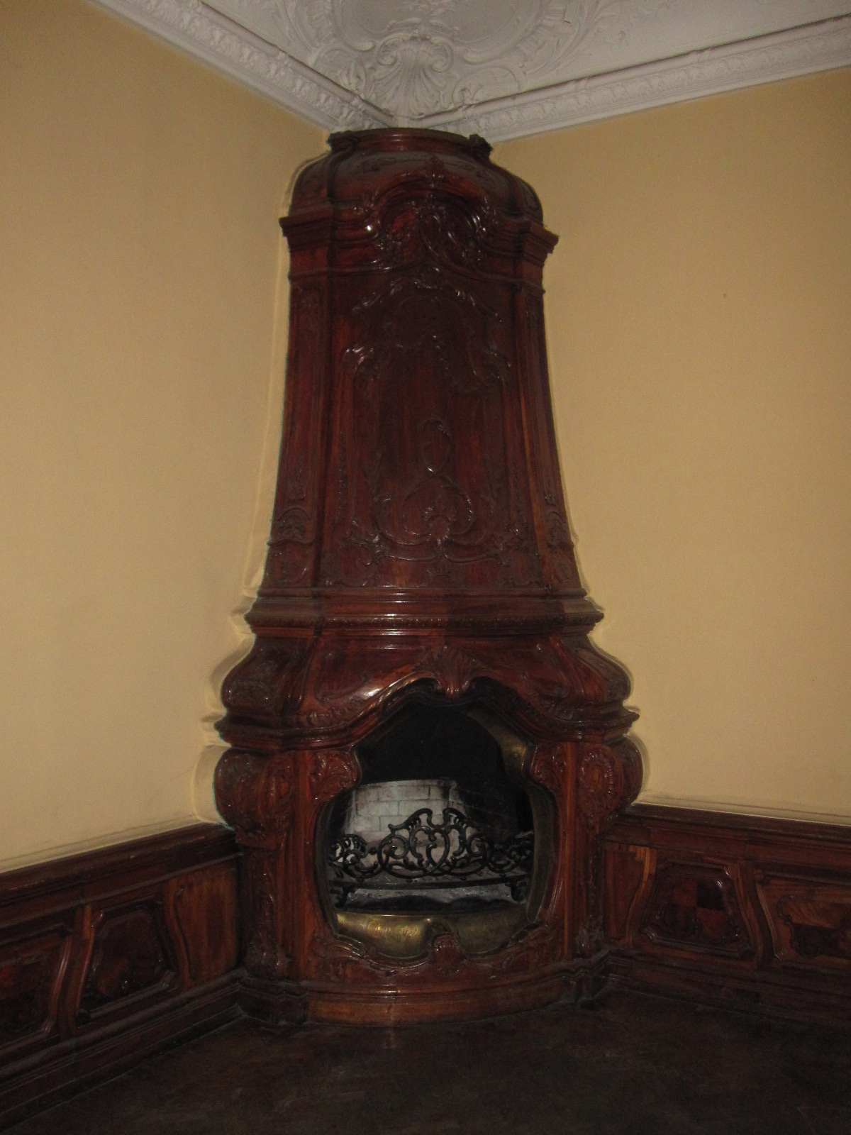 Дом Е.И. Набоковой с дворовыми флигелями. Здесь родился и в 1899-1917 гг. жил писатель В.В. Набоков: Большая Морская улица, 47, Адмиралтейский район, Санкт-Петербург